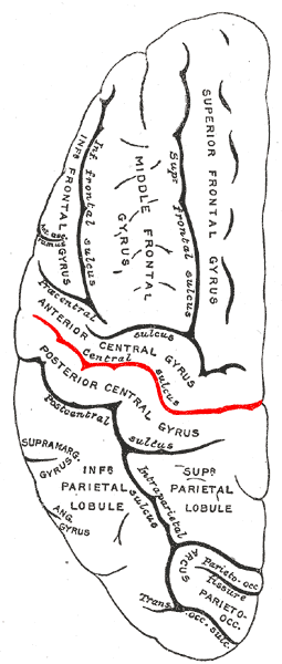 central sulcus.